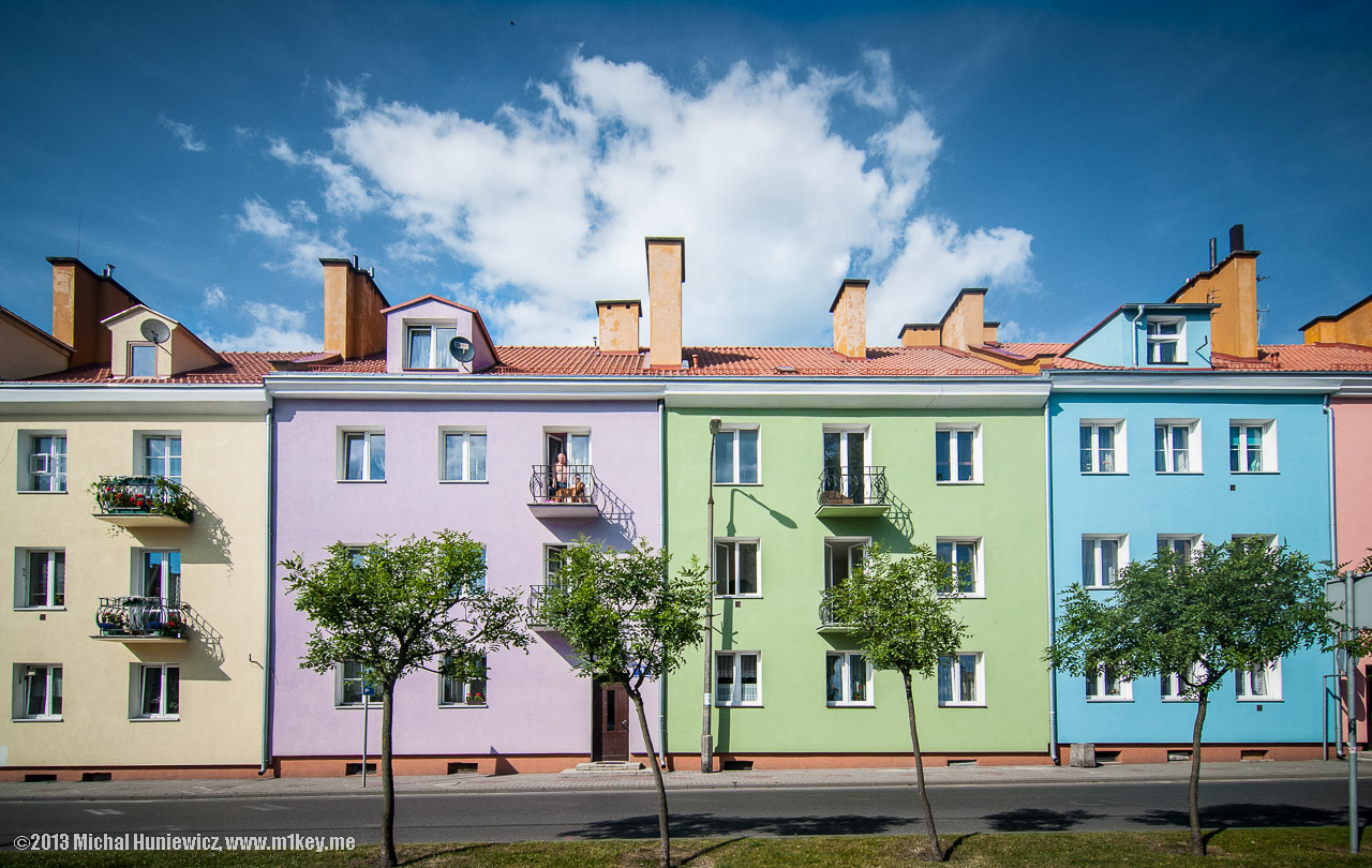 Stare Miasto w Morągu.